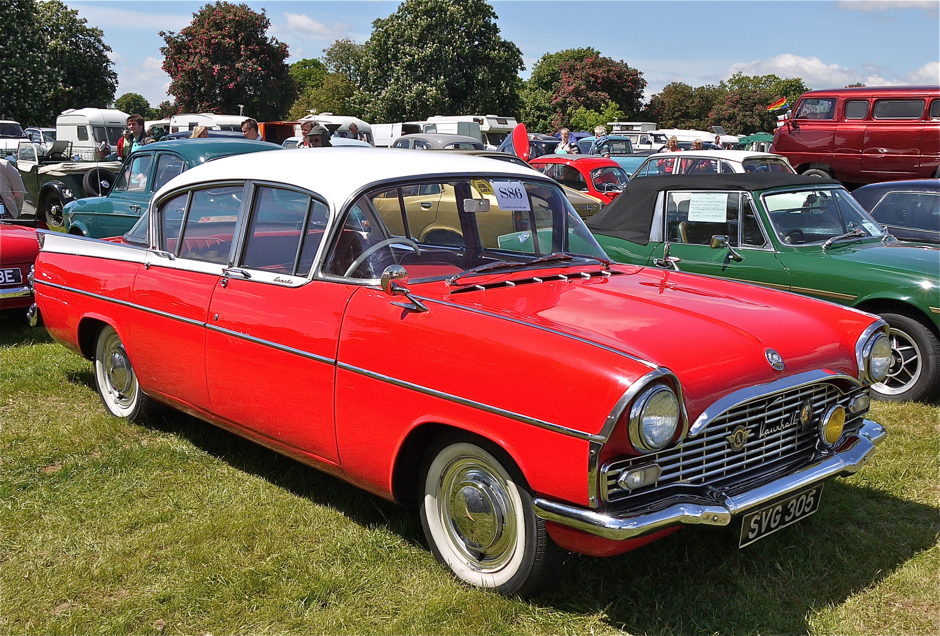 Panasonic G1 14-45 Lens